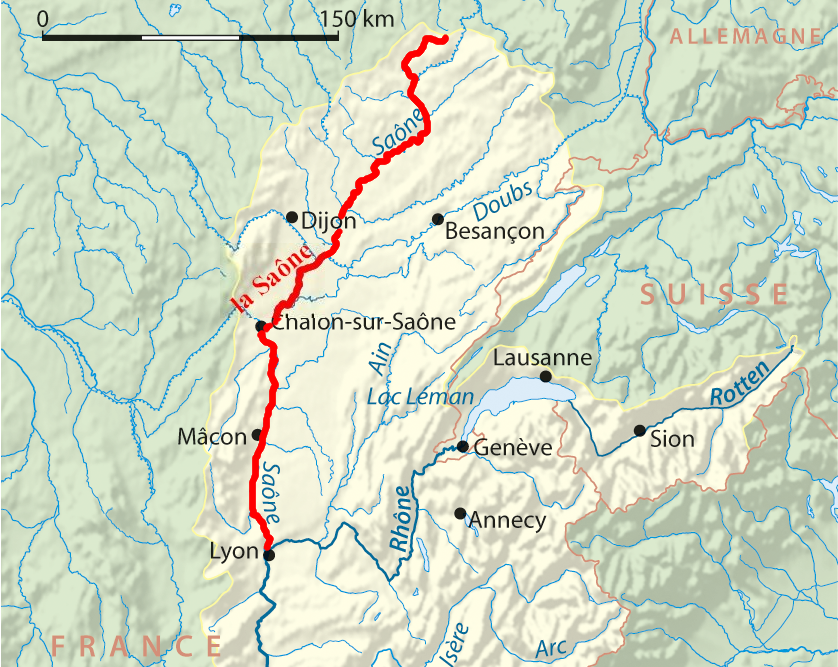 Surlignage du tracé de la rivière Saône – France (version corrigée)